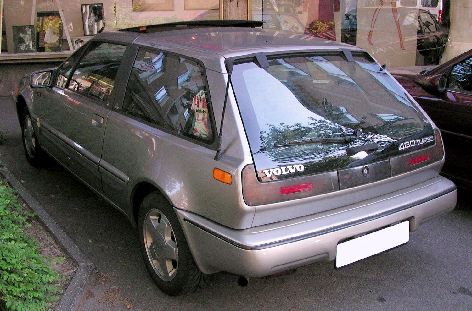 Aachen, Volvo 480